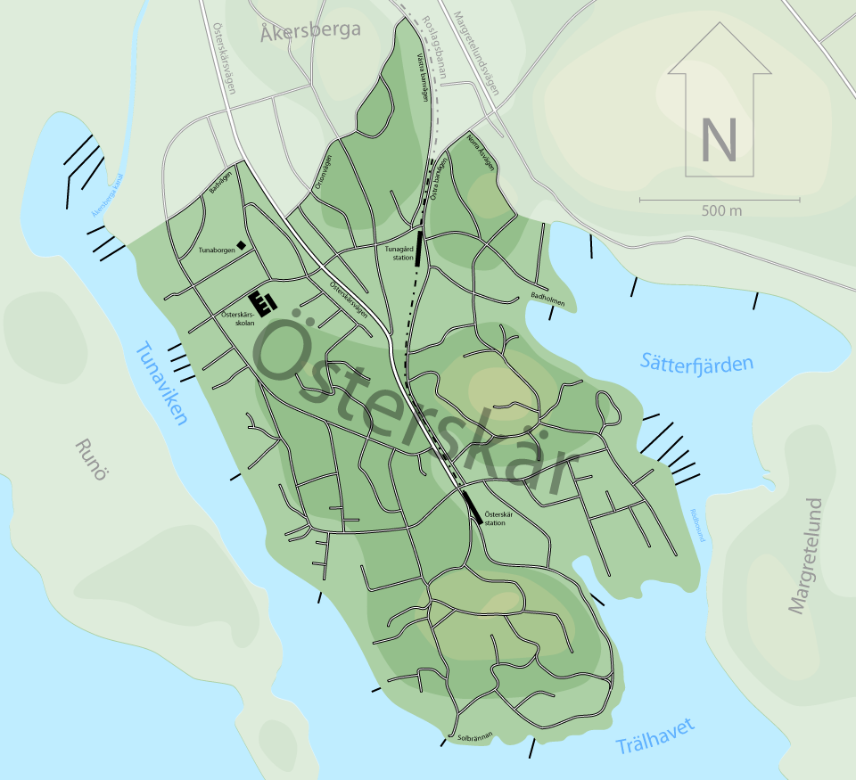 Karta över Österskär (Österåker, Stockholms län, Sverige).